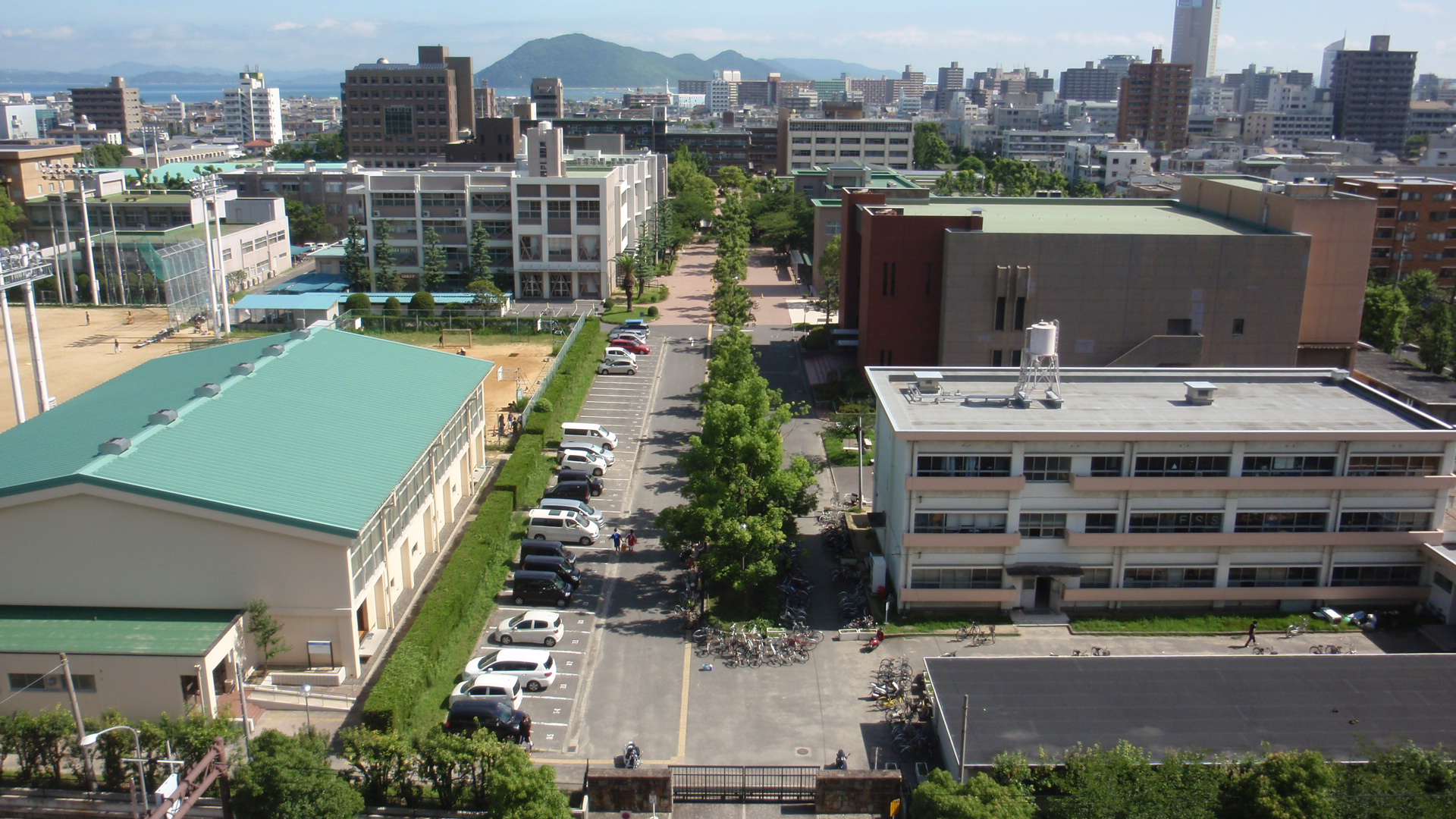 香川県高松市の国立香川大学幸町キャンパス(本学)。